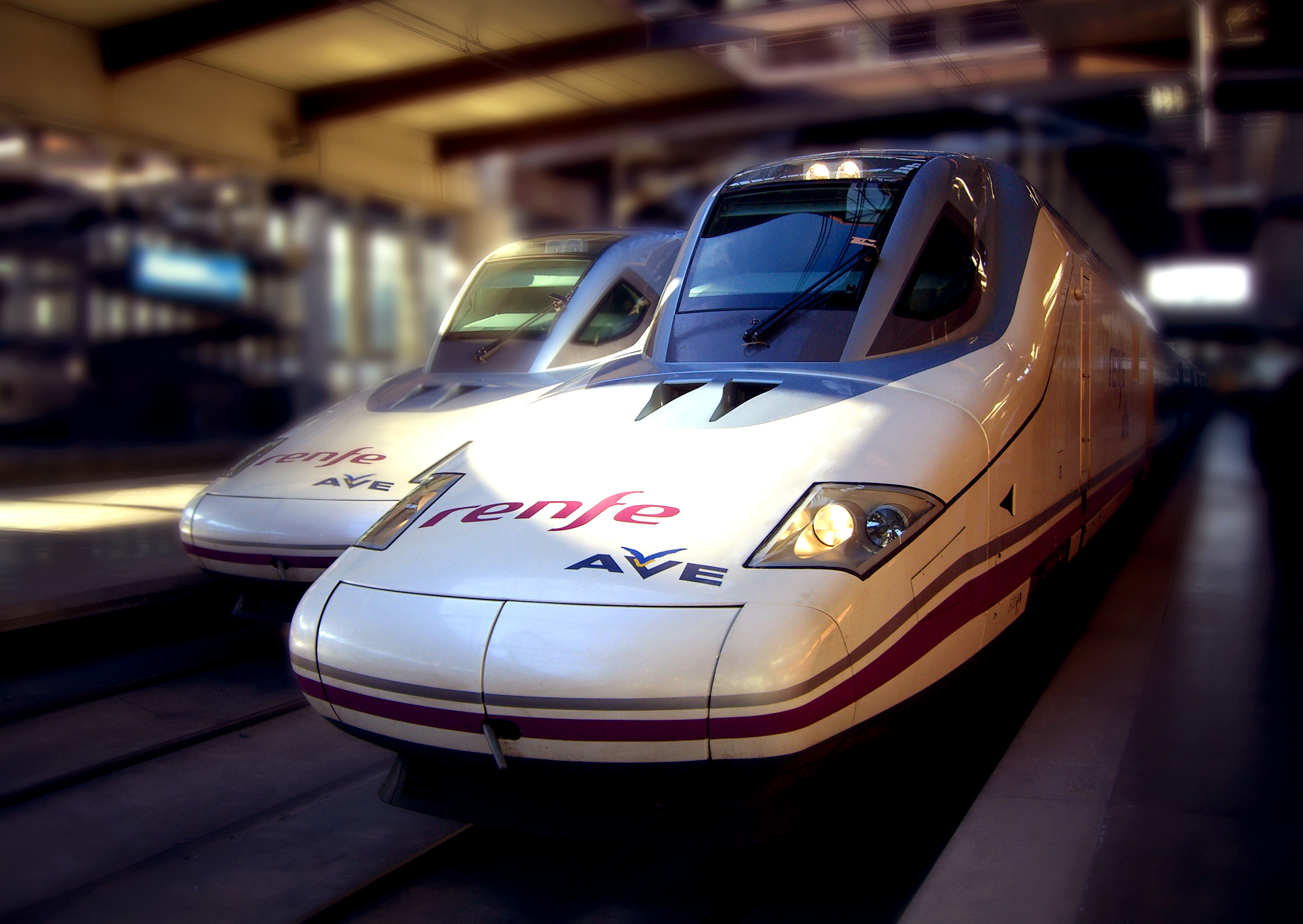 102 de Renfe o Talgo 350 le llaman 'el pato' por su extraña forma.